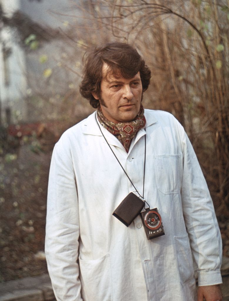 Plesnivy Károly 1973 kb.